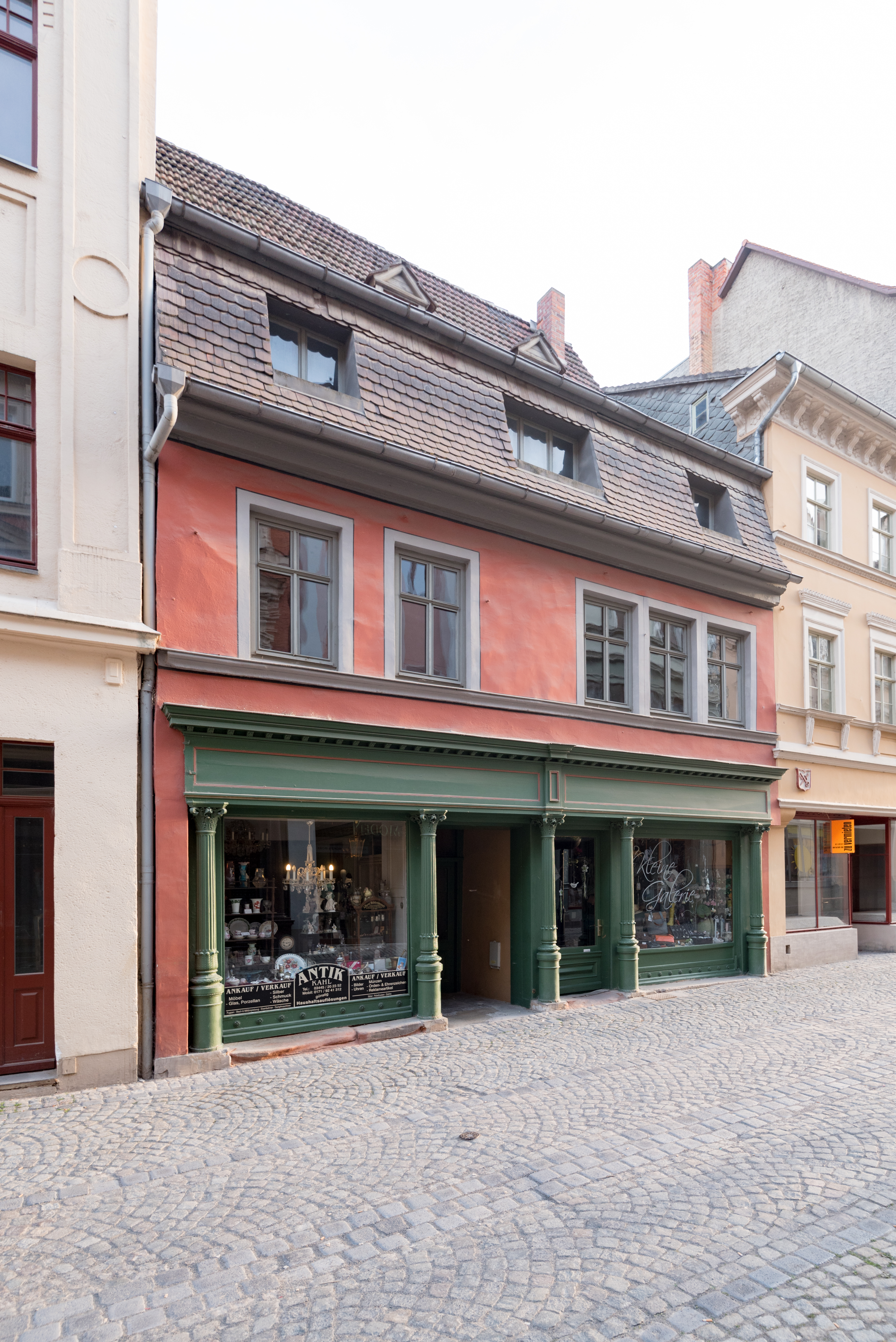 Naumburg (Saale), Herrenstraße 15